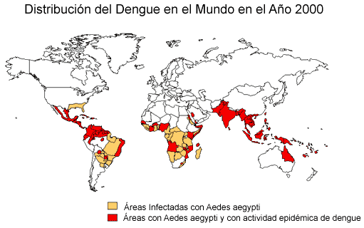 Distribución del dengue y su vector, al año 2000.